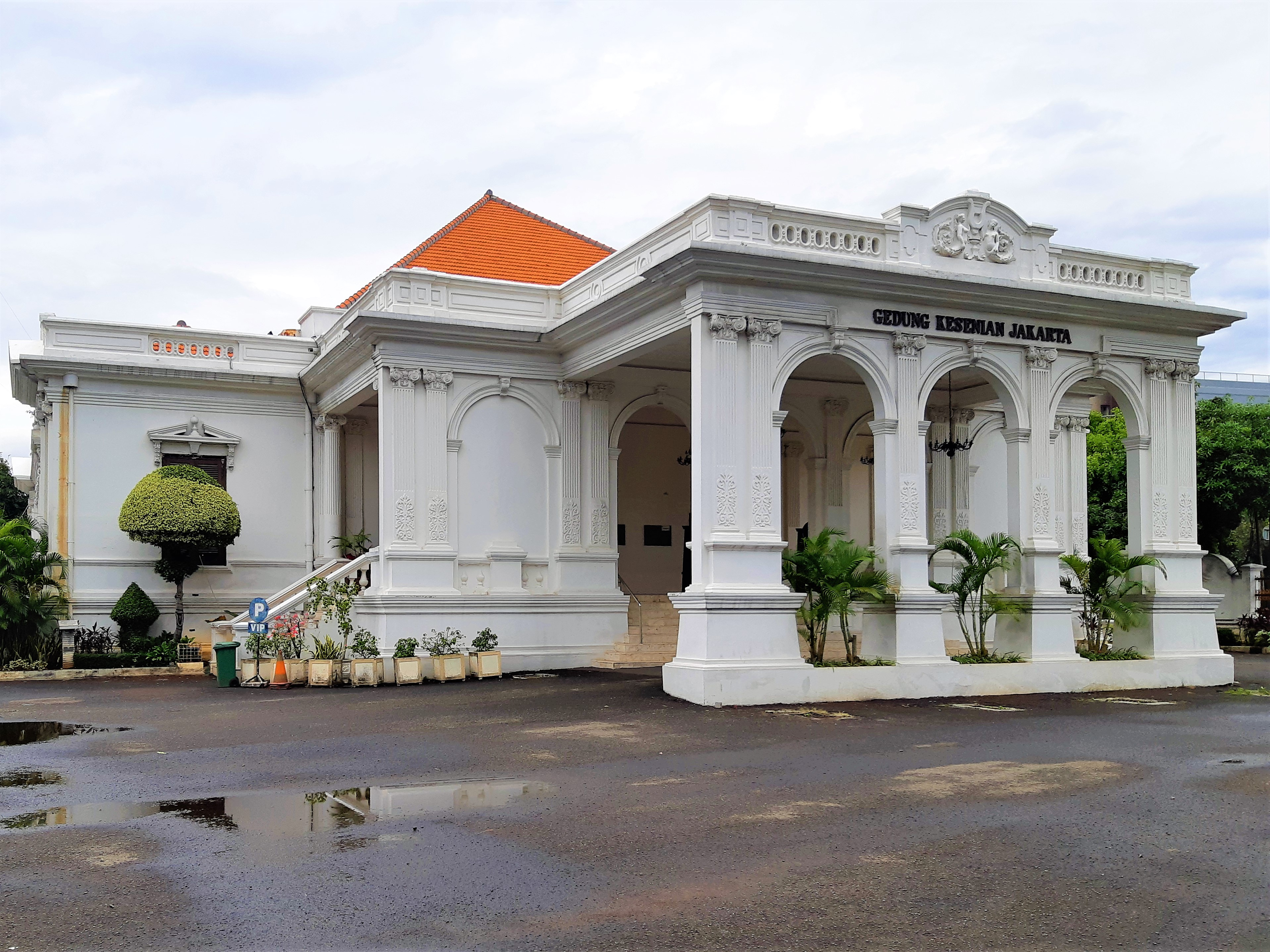 Gedung Kesenian Jakarta, 2018